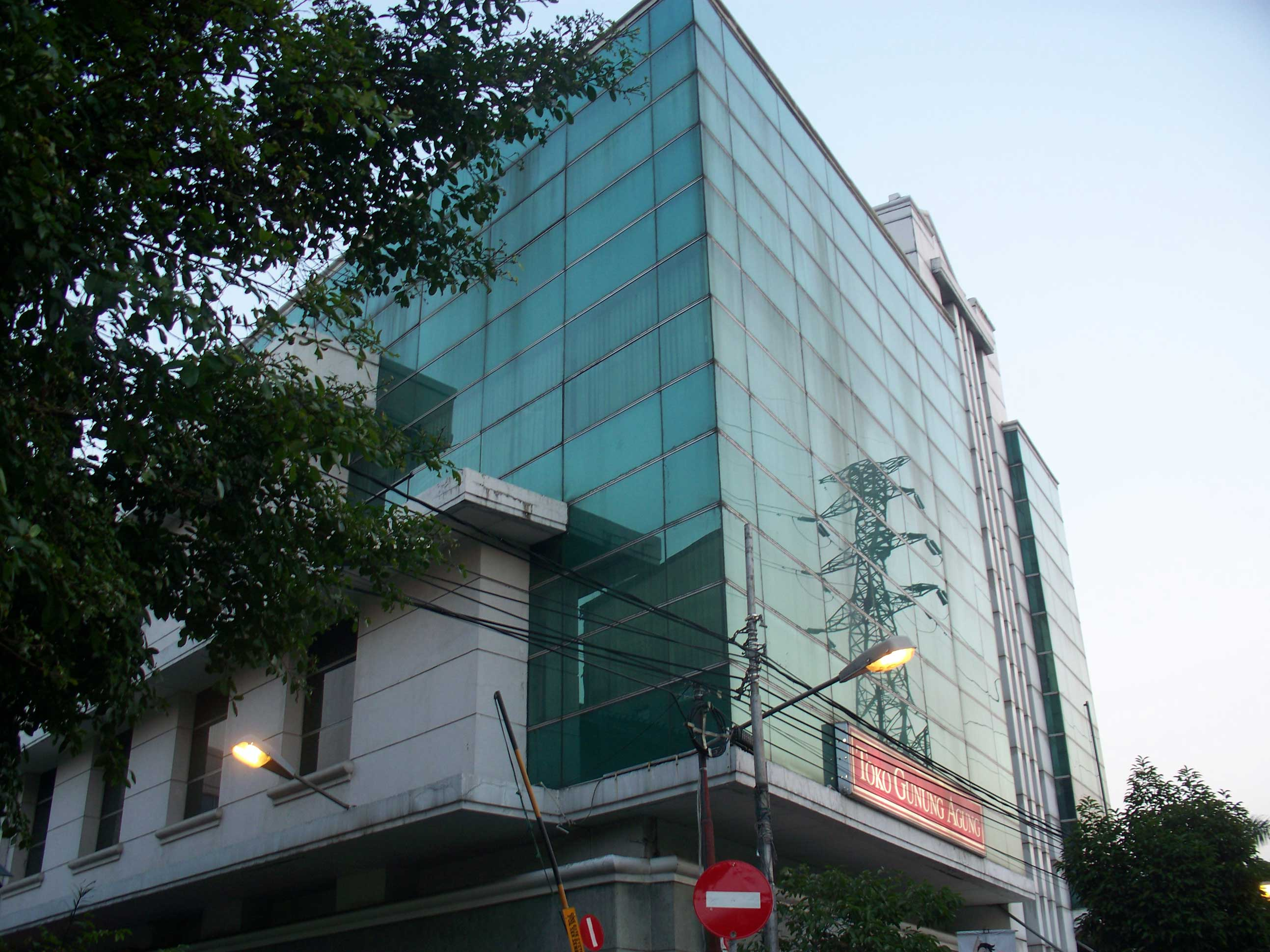 Toko Gunung Agung Kwitang